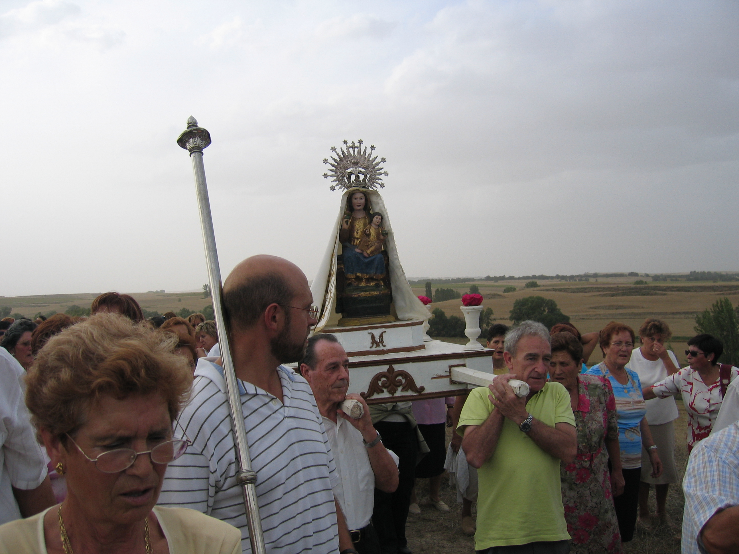 La romería de Villacisla de Presencio se celebra el primer fin de semana de septiembre. Foto tomada por Sanbec